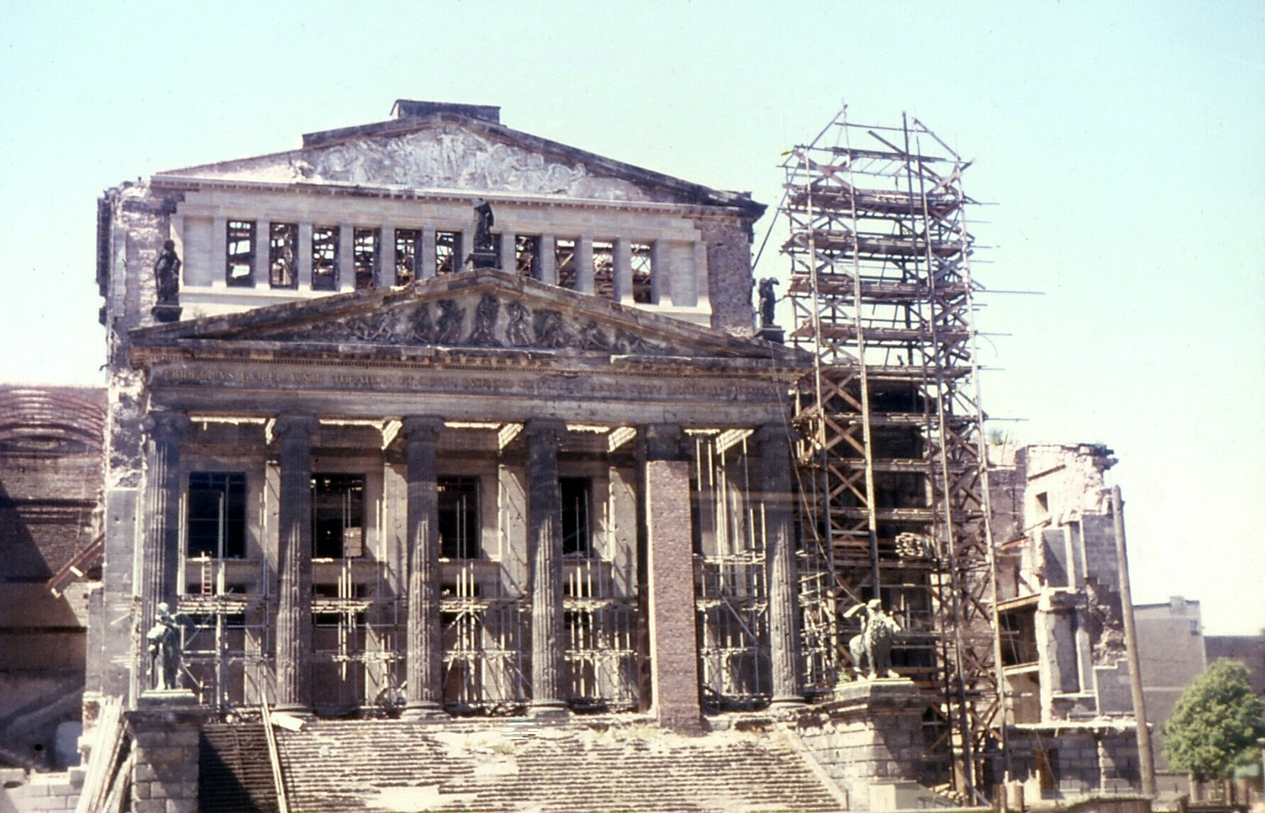 BerlinSchauspielhaus1968